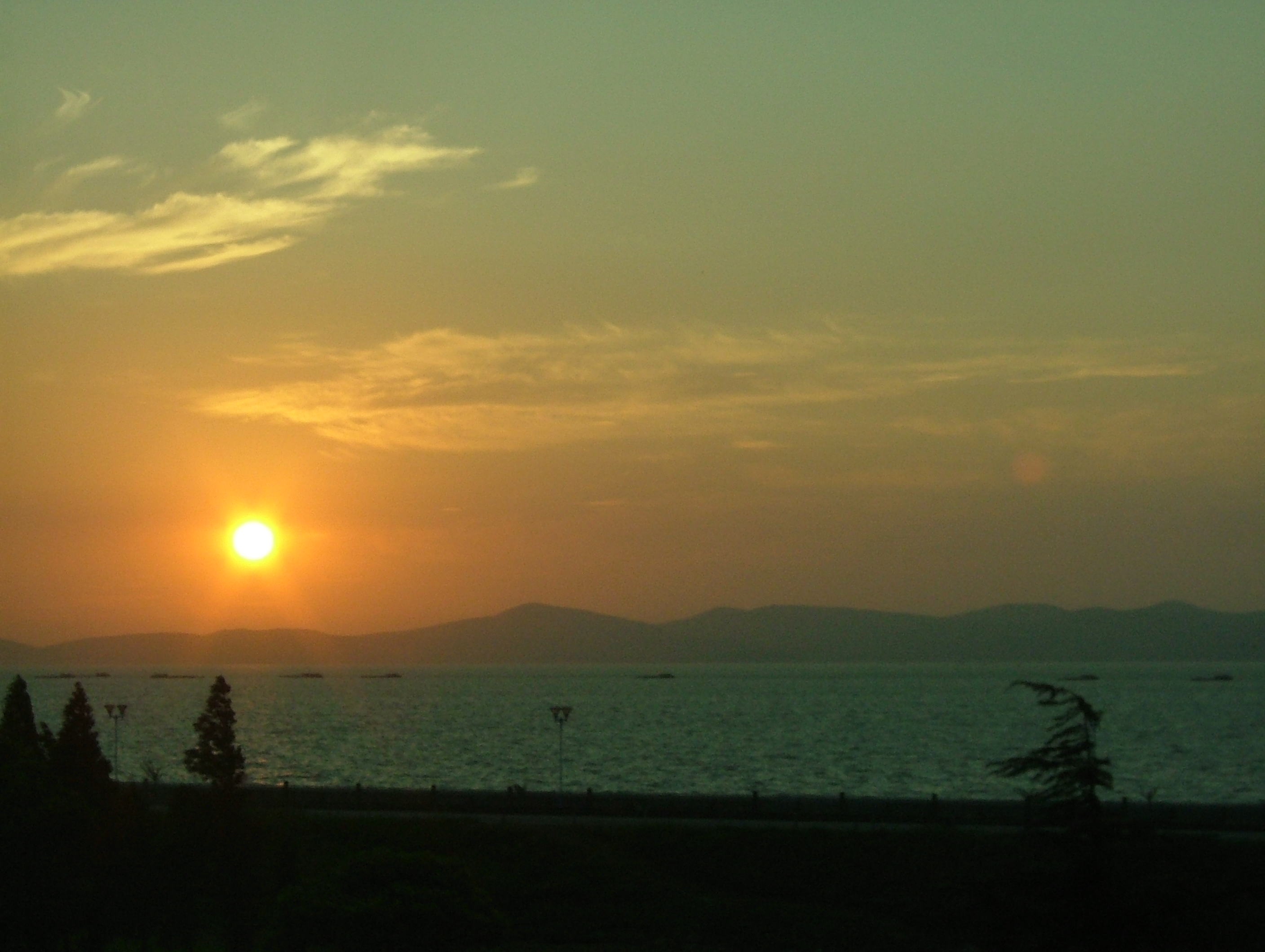 太湖日出 (Sun rise of Taihu Lake)